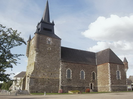 Eglise fortifiée de Signy-le-Petit (Ardennes, France)